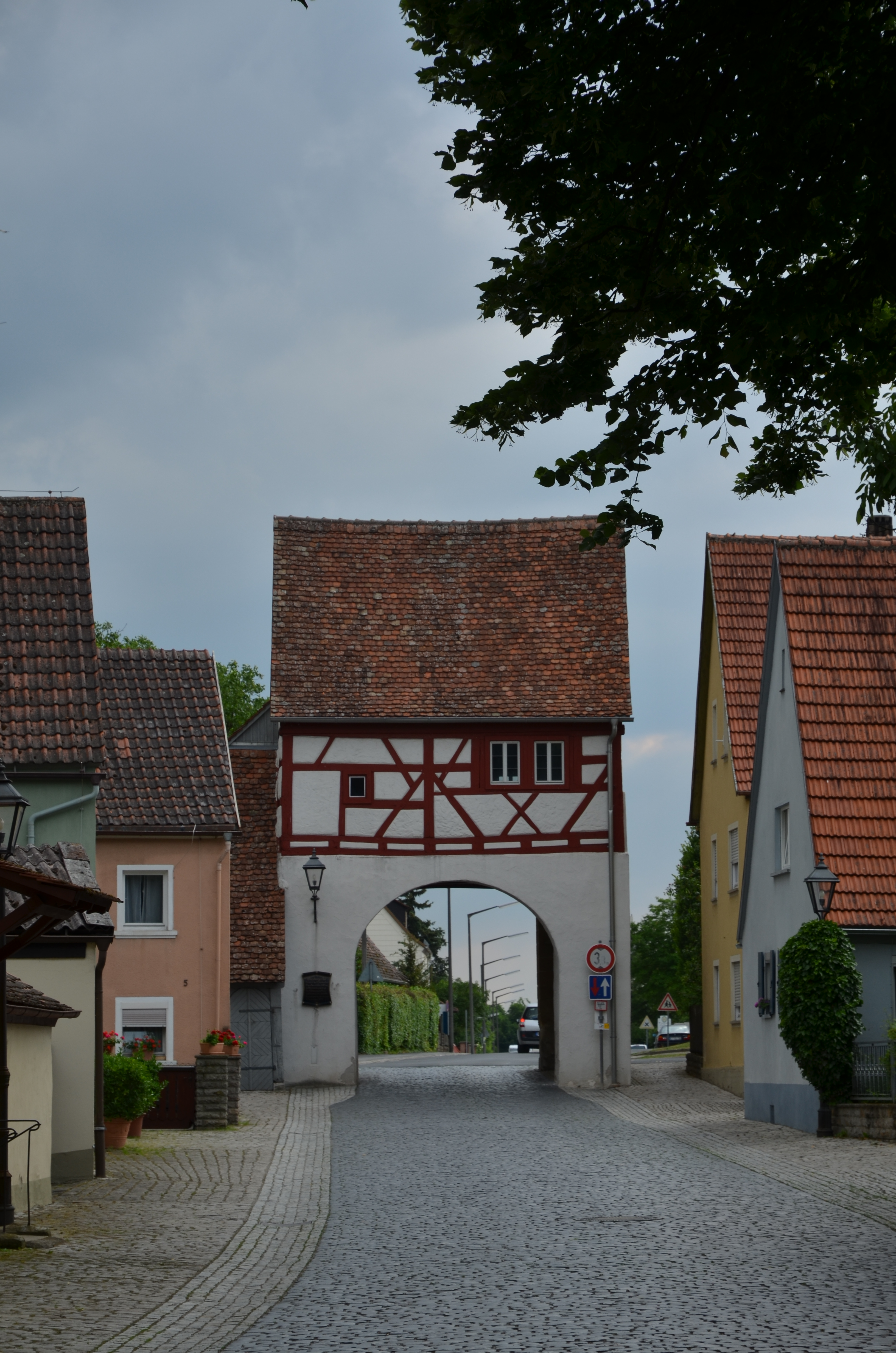 Markt Einersheim, Würzburger Tor